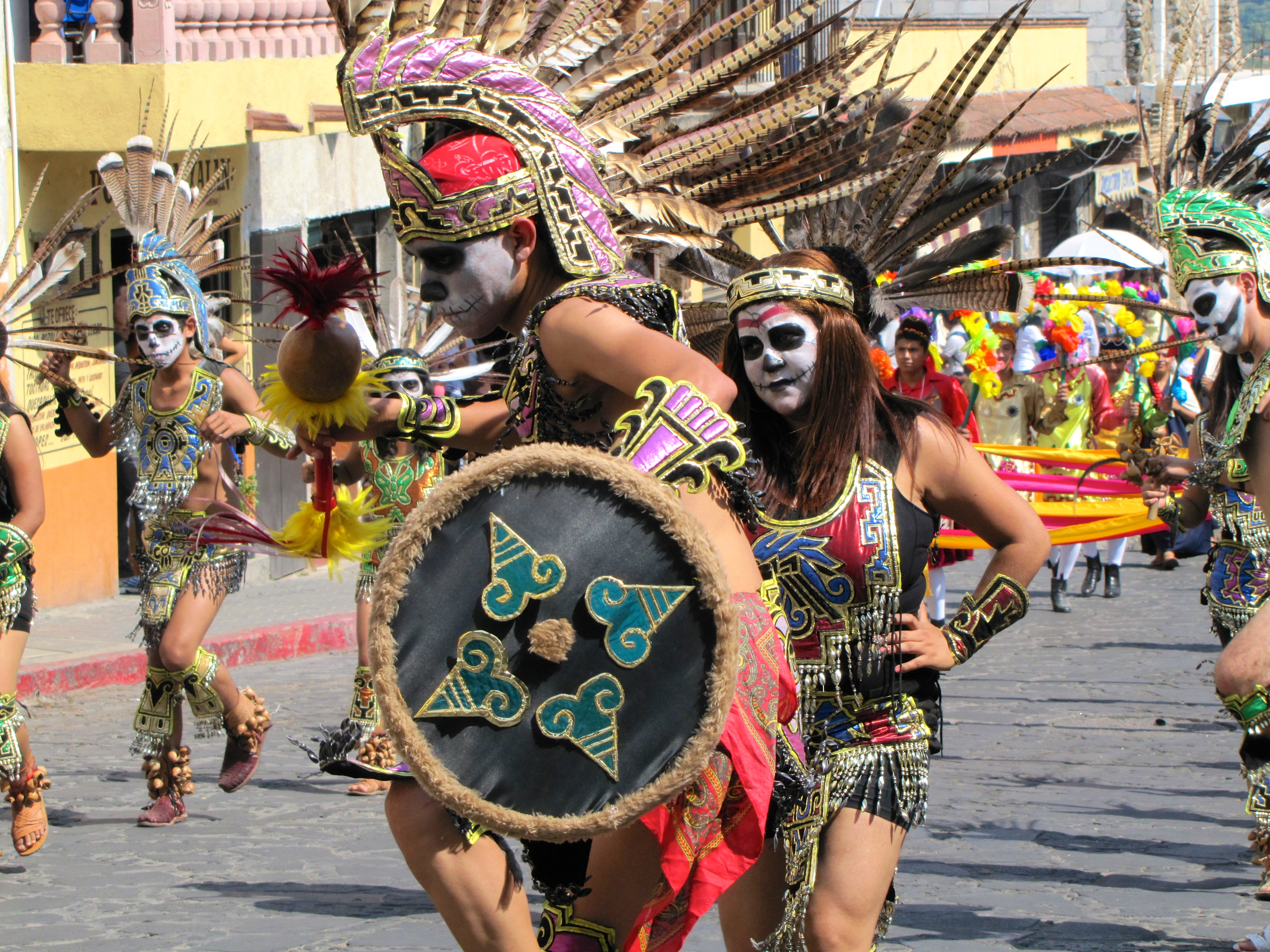 Vestimenta festiva prehispánica para celebrar la víspera del Día de Muertos.